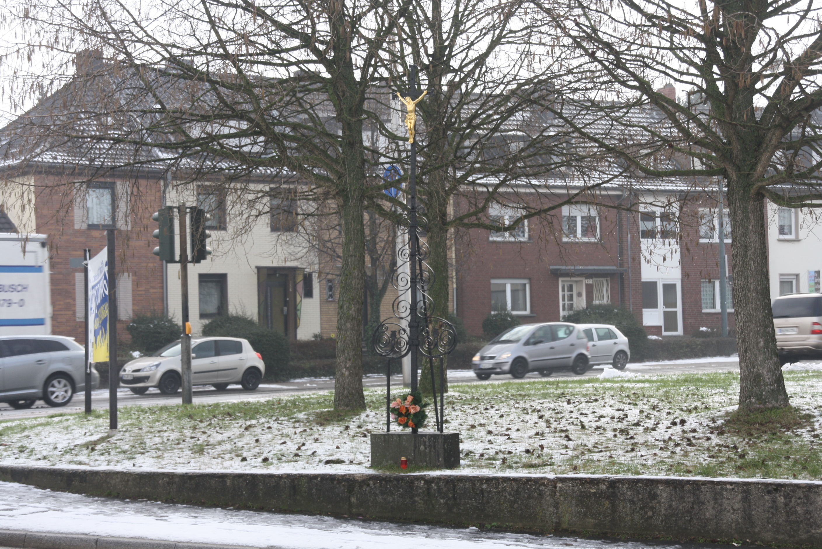 Das Wegekreuz Nr. 1/065 aus der Liste der Baudenkmäler in Düren am neuen Standort